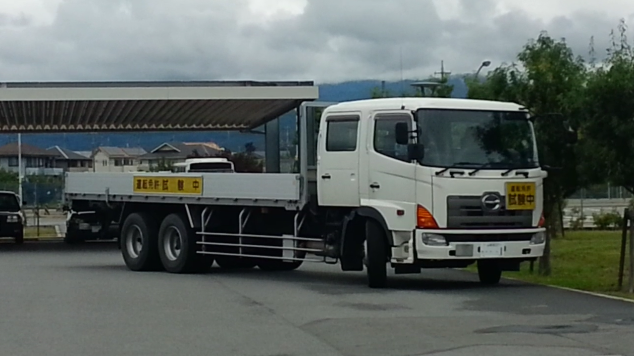 駐車作業中の大型試験車、車種は日野プロフィア。 車両は山梨自動車学校所属で、県警と自動車学校が共同で使用。